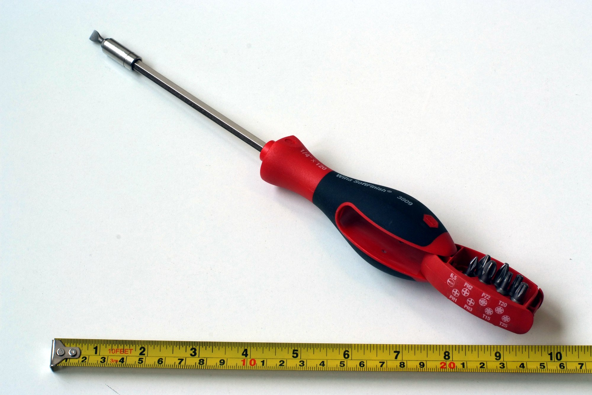 Bithalter mit integriertem Bit-Magazin